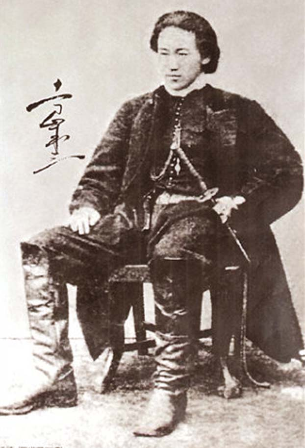 Ảnh chụp chân dung Hijikata